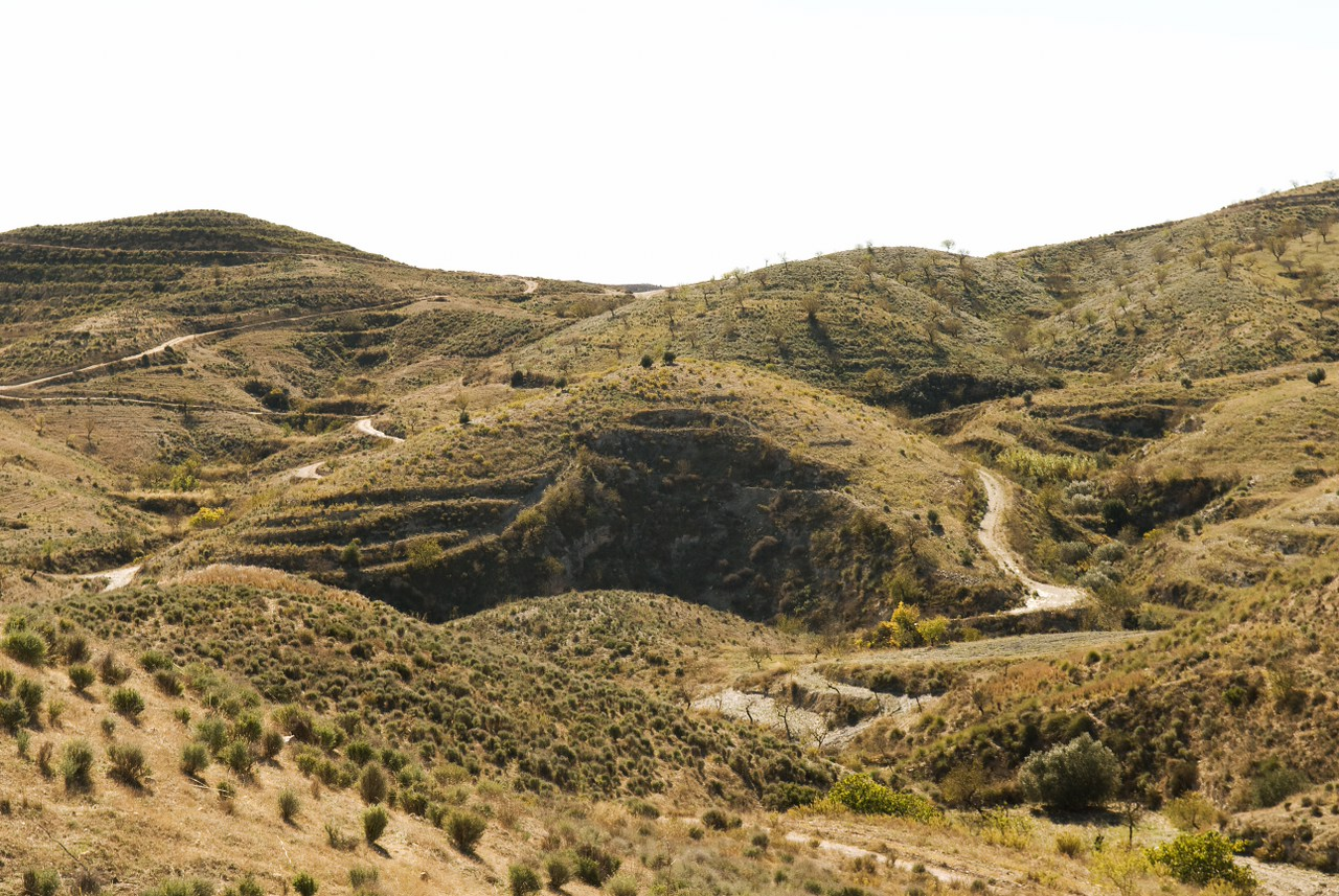 Vista de ruta senderista que discurre por las inmediaciones del Cabezo de la Jara